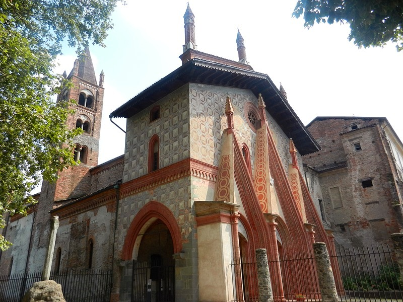 Buttigliera Alta - Abbazia di S. Antonio di Ranverso